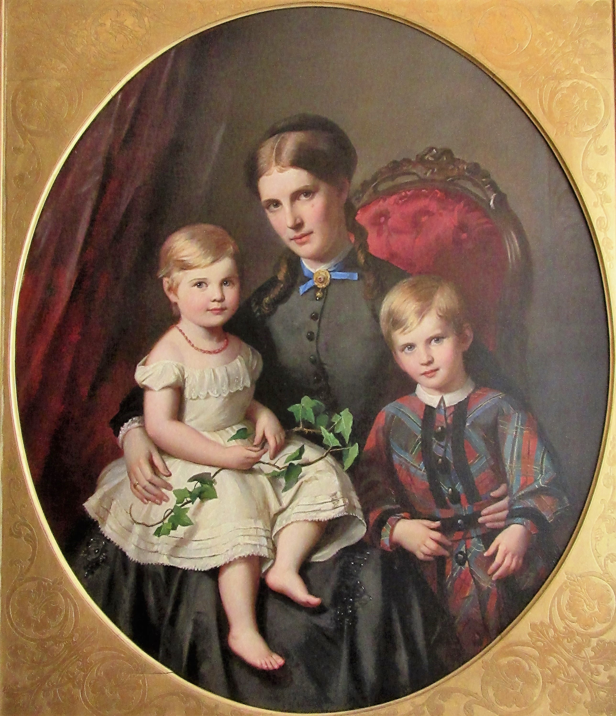 Louis Asher: Frau Fehling mit ihren Kindern, vor 1867, Öl auf Leinwand, H 139 cm, B 109 cm, unbezeichnet. Ursprünglich zugehöriger Rahmen mit reicher Stuckierung. Inv. Nr. G 937. Erworben aus dem Besitz der Familie Fehling. Behnhaus Lübeck. Henriette Charlotte Fehling (1842-1929) war die Ehefrau von Johannes Fehling. Die abgebildeten beiden ältesten Kinder waren Johannes Heinrich (* 1863) und Emilie Charlotte (* 1865).